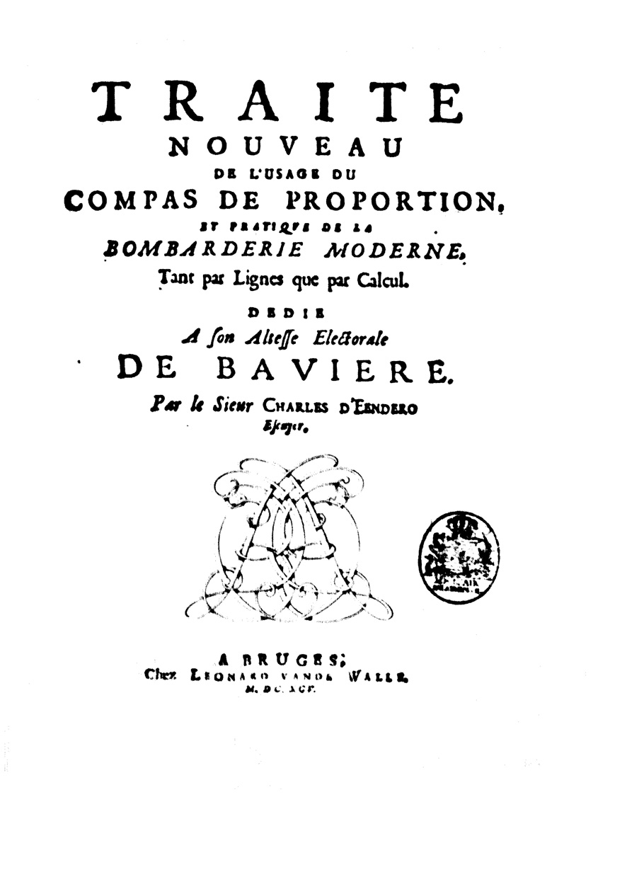 Traité nouveau de l'usage du compas de proportion, et pratique de la bombarderie moderne, ... par le sieur Charles D' Eendero …. - A Bruges : chez Leonard van de Walle, 1695. - [16], 199, [7] p., 24 c. di tav. : ill. ; 4º .